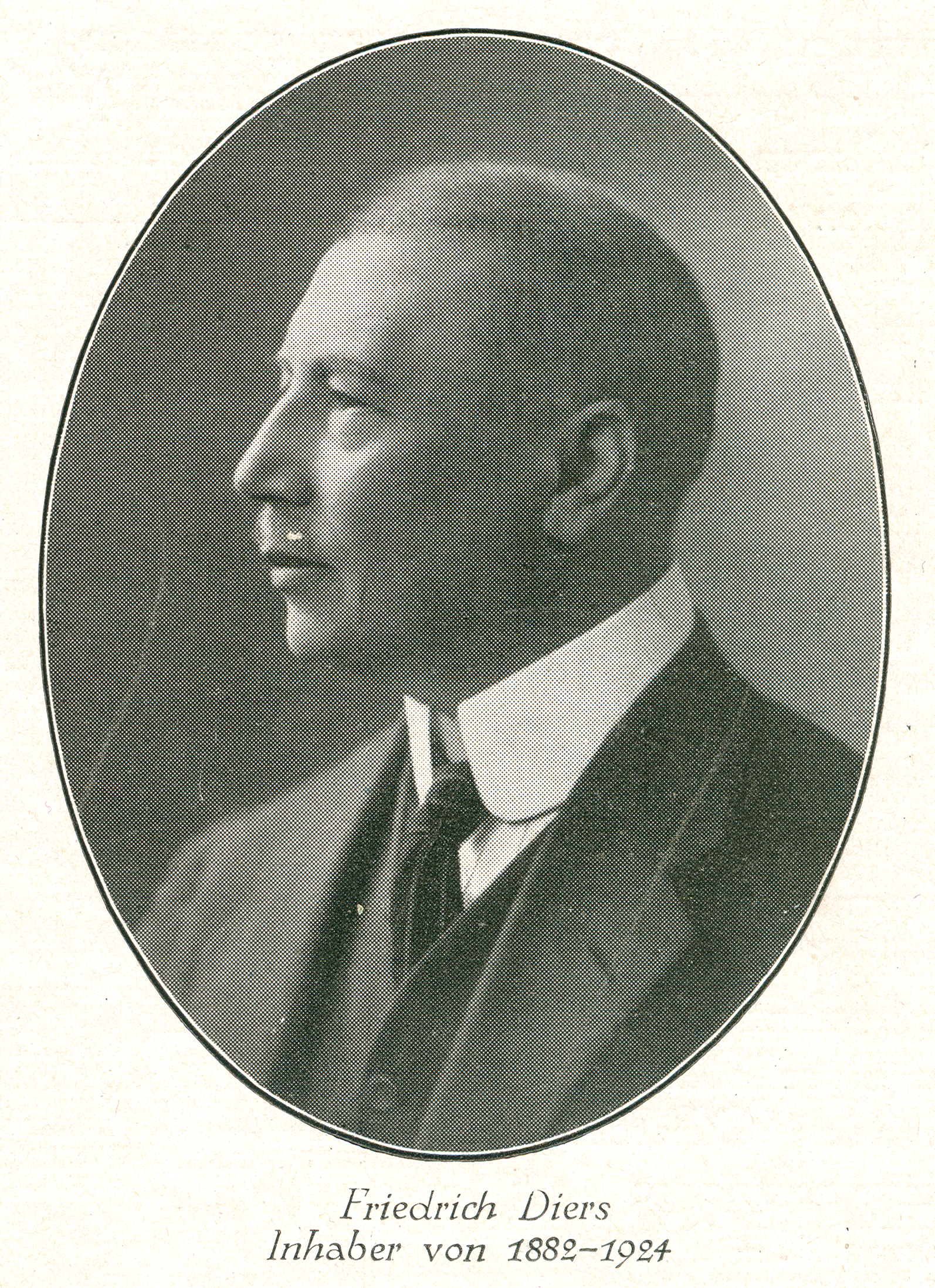 Friedrich Diers senior, von 1882 bis 1924 Inhaber der Göhmannschen Buchdruckerei in Hannover. Er ließ im Jahr 1906 von der Baufirma Robert Grastorf GmbH, Hannover, das Druckereigebäude in der Osterstraße 83 errichten.